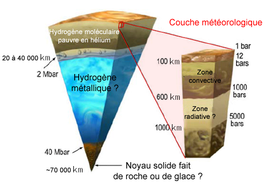 Structure interne de Jupiter : hypothèses en vigueur en 2011 selon une présentation effectuée par la NASA avant la mission de la sonde spatiale Juno